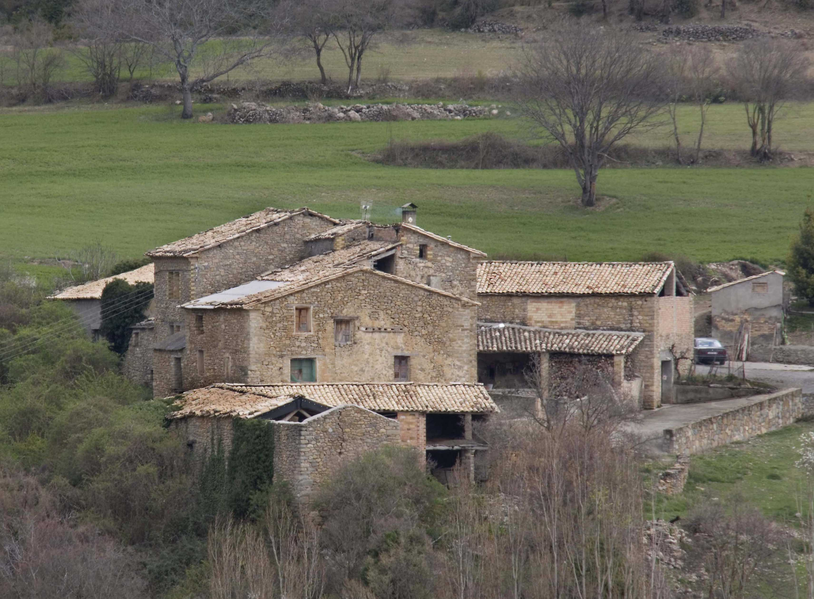 Riguala, poblet del municipi d'Isàvena, a la Ribagorça Aragonesa, als peus del Coll de Vent, de la serra del Cis (Sierra de Sis)